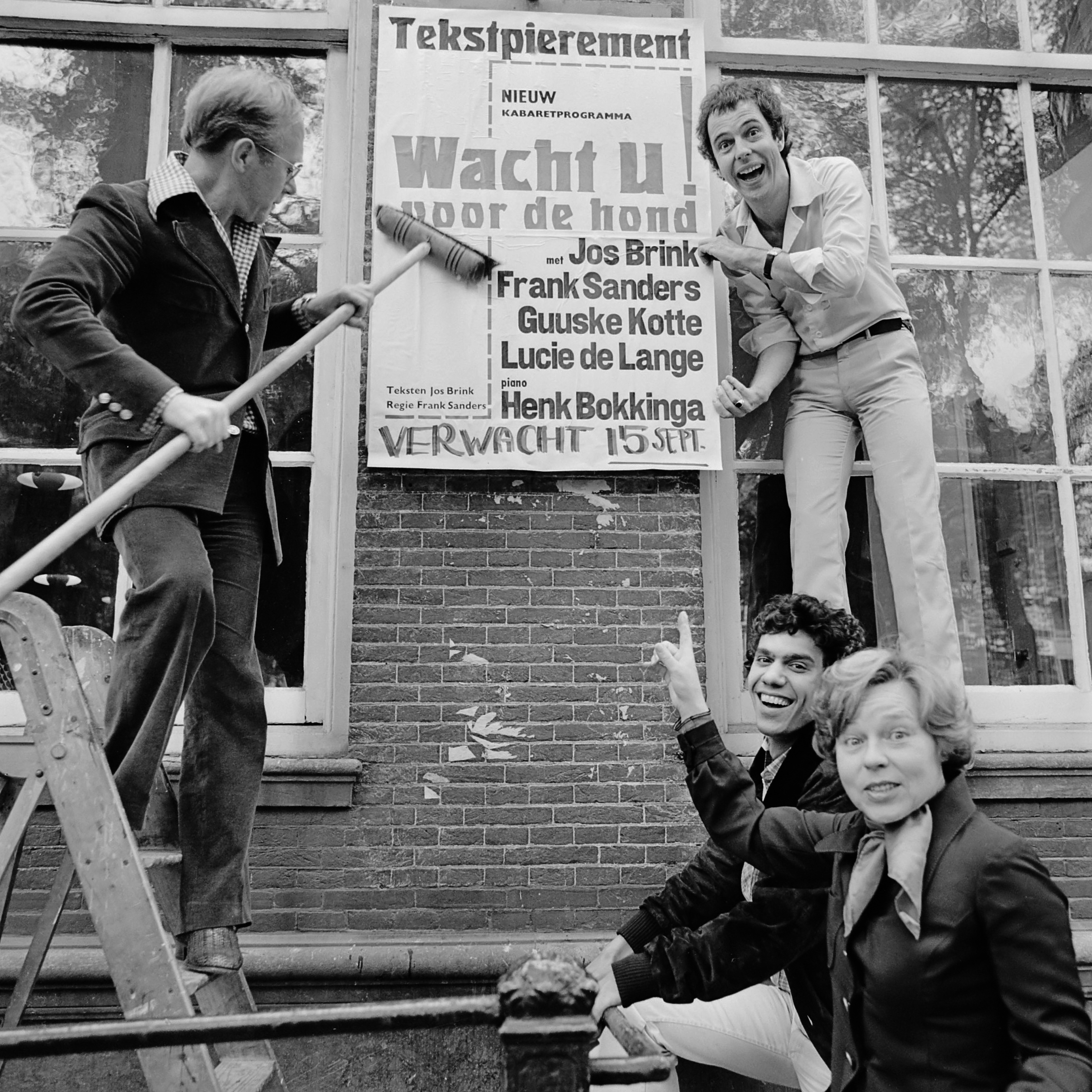 Sieto Hoving, Jos Brink, Frank Sanders en Marijke Hoving? plakken affiches bij Tingel Tangel in Amsterdam 11 augustus 1977